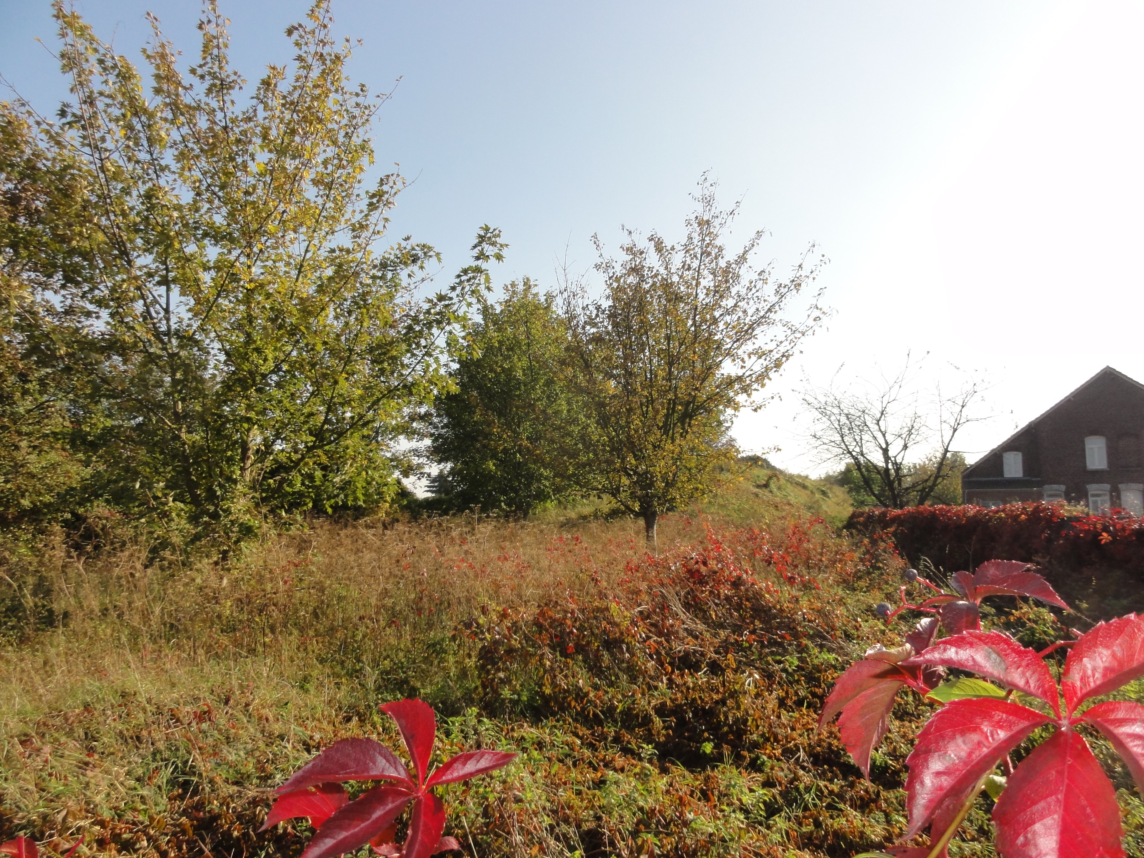 Terril n° 69A dit Cavalier du 2 de Meurchin, Fosse n° 2 - 7 de la Compagnie des mines de Meurchin, Meurchin, Pas-de-Calais, Nord-Pas-de-Calais, France.